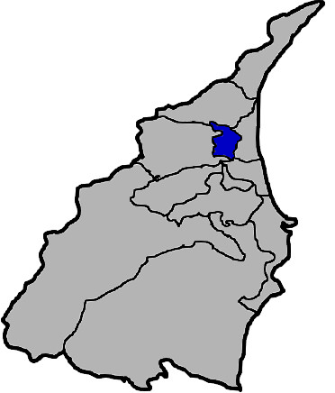 台灣省宜蘭縣宜蘭市 KaurJmeb於2005年2月7日為編寫zh:宜蘭市所繪